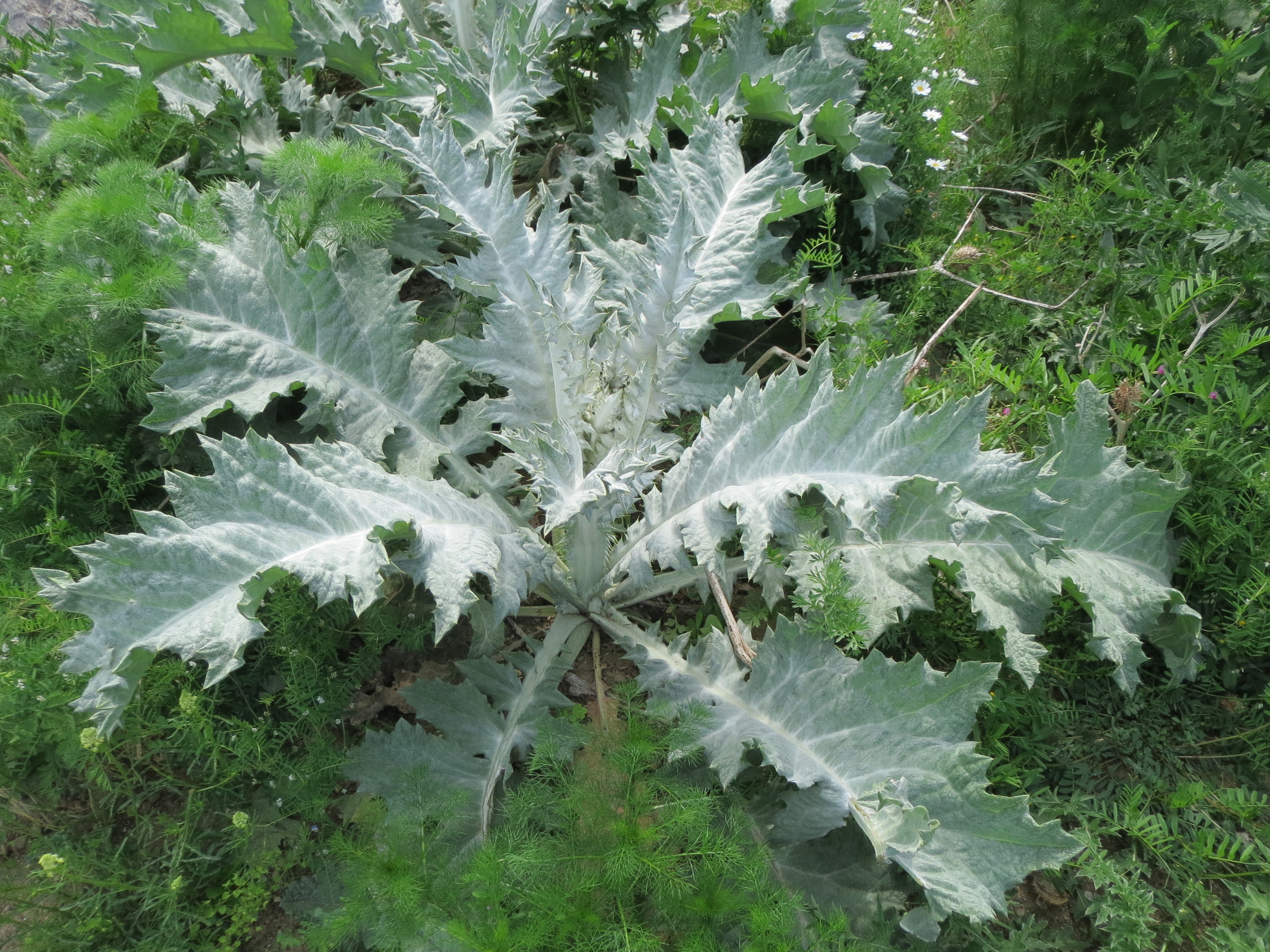 Eselsdistel (Onopordum acanthium) in Hockenheim